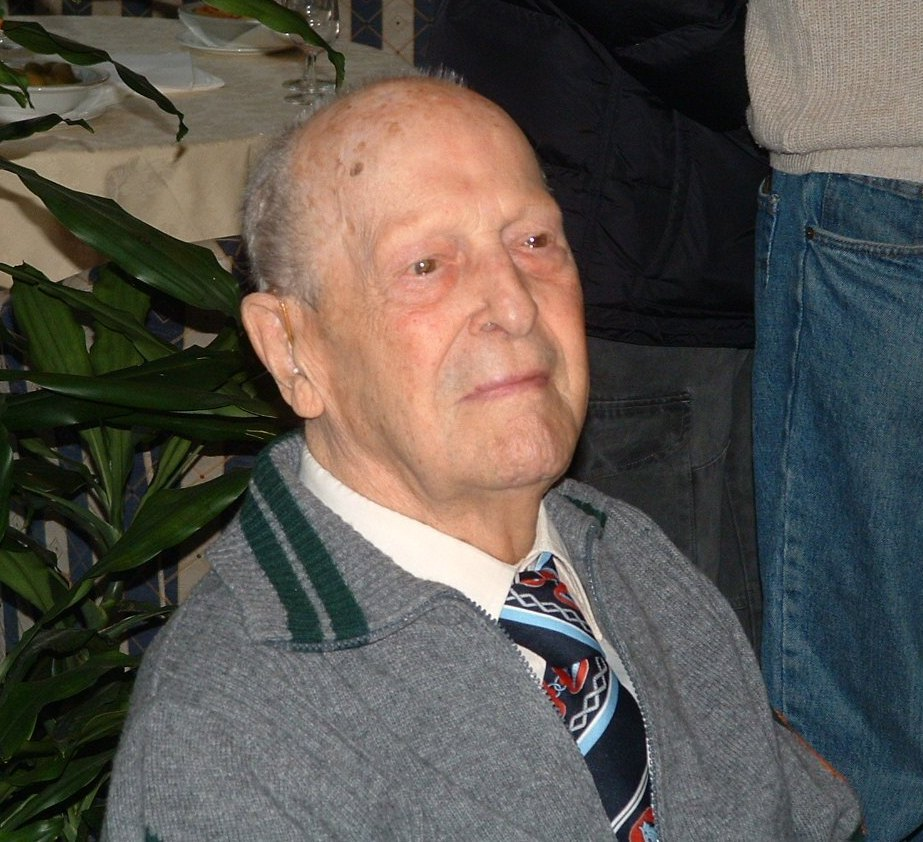 foto del Grande Maestro di scacchi Enrico Paoli.